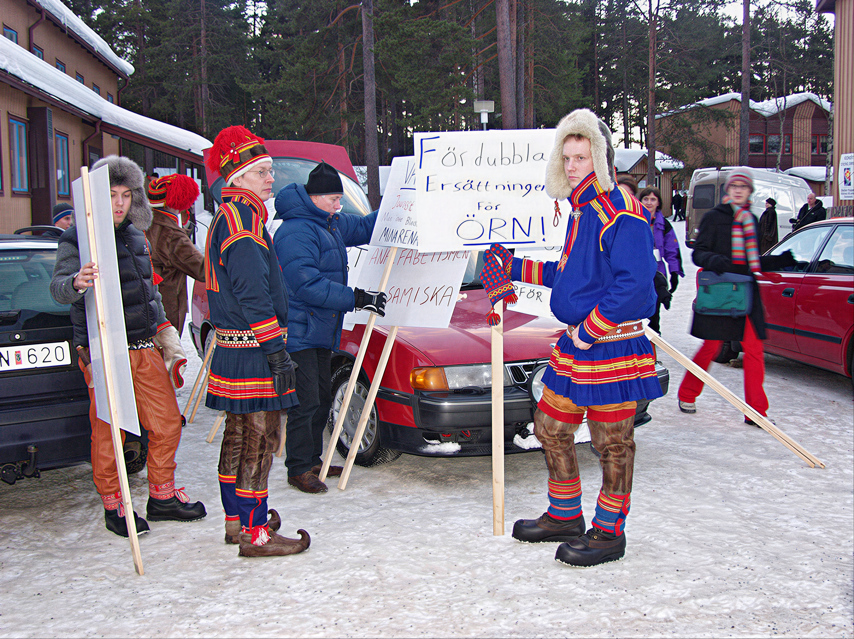 Samen protestieren für mehr geldliche Ersatzleistungen des Staates bei Verlusten in ihren Rentierherden durch Raubtiere